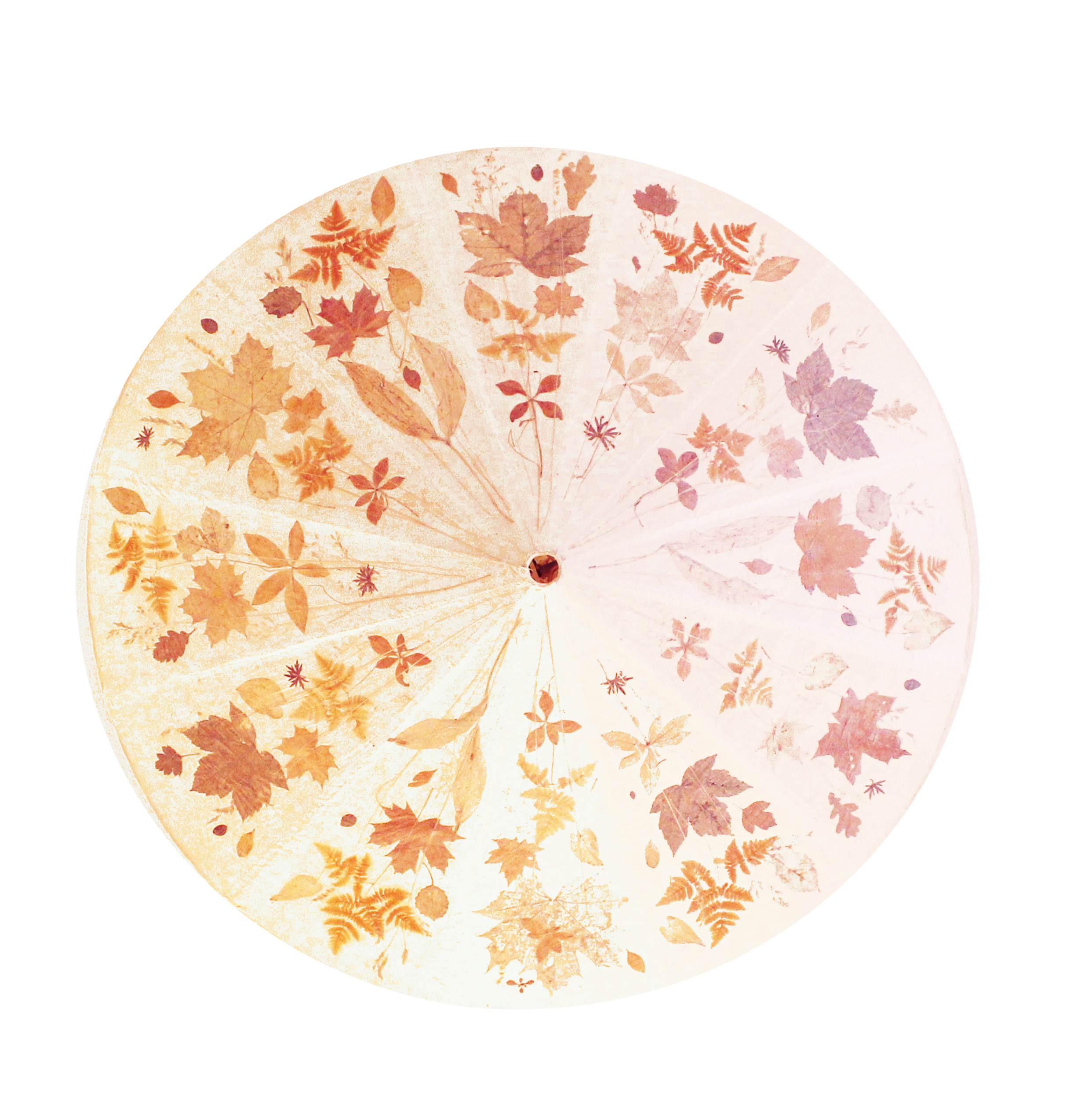 takplafond